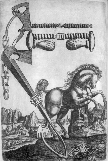 Беларуская (тарашкевіца): Крыштап Дарагастайскі «Гіпіка, альбо Кніга пра коней»